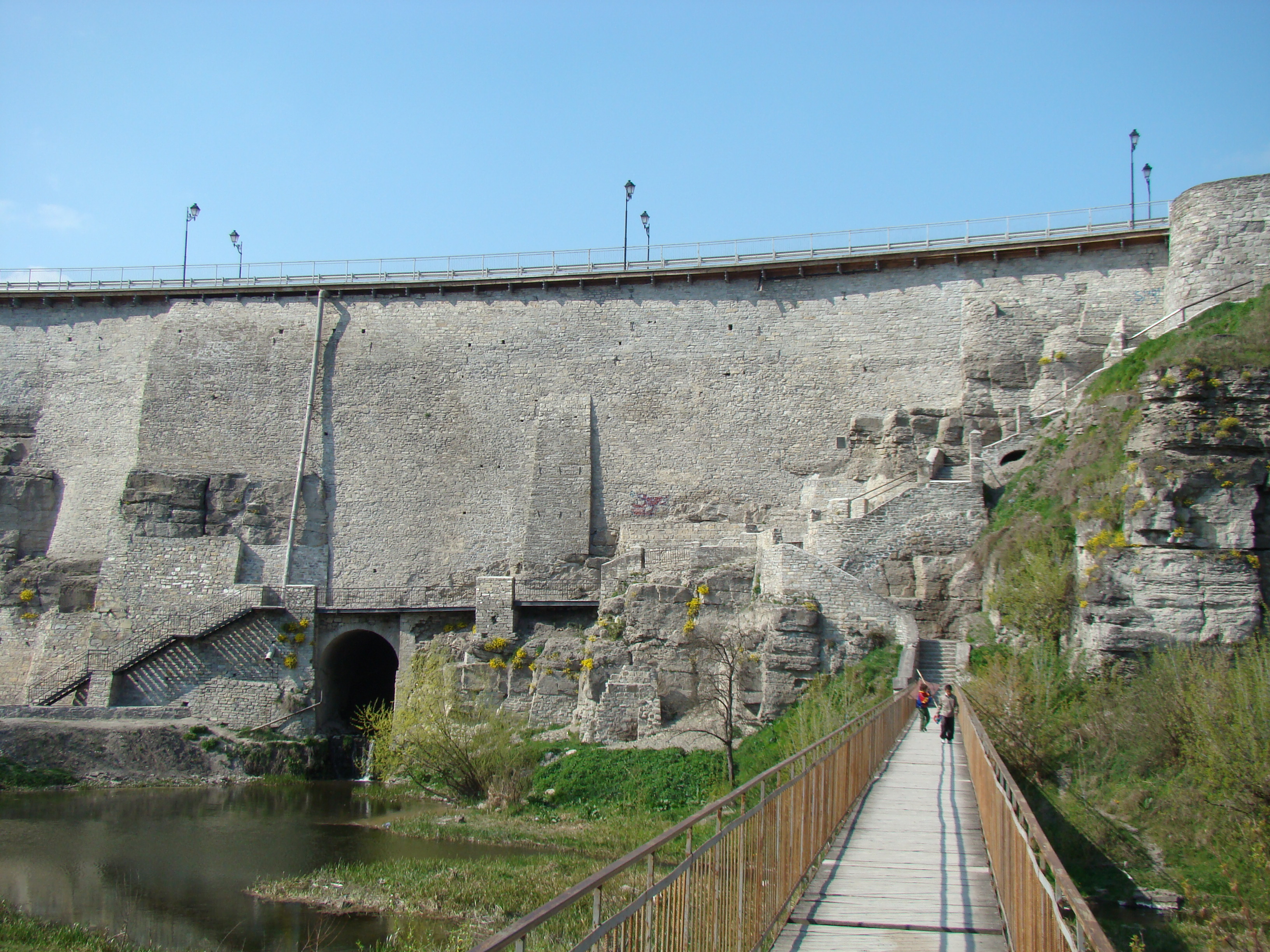 Замковий міст у Кам'янці-Подільському. Вигляд з південного боку